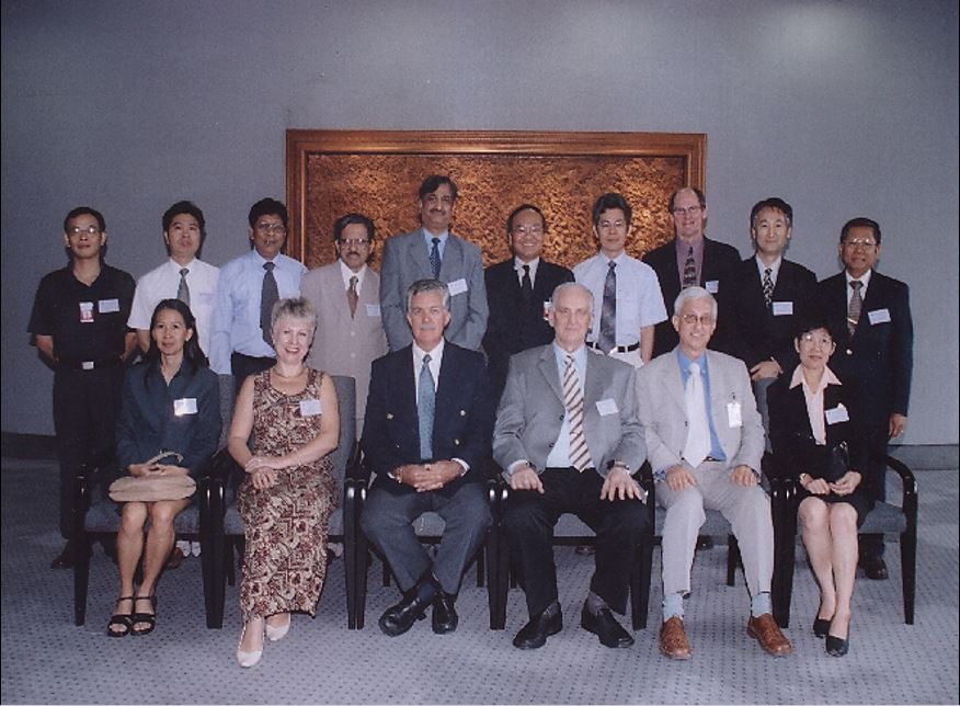 კლიმატის ცვლილების სამთავრობათშორისო ექსპერტთა ჯგუფი 2007 წელს ნობელის პრემიის ფფაჯილდოებაზე. ქვემო რიგში მარცხნიდან მეოთხე: ზურაბ კოპალიანი